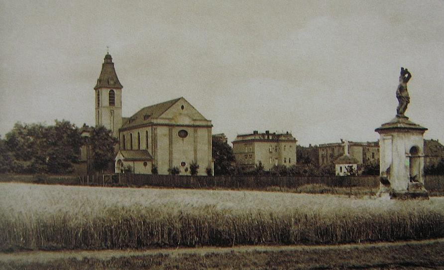 Miejsce na którym powstał kampus WSP (UO) w latach 40. XX wieku